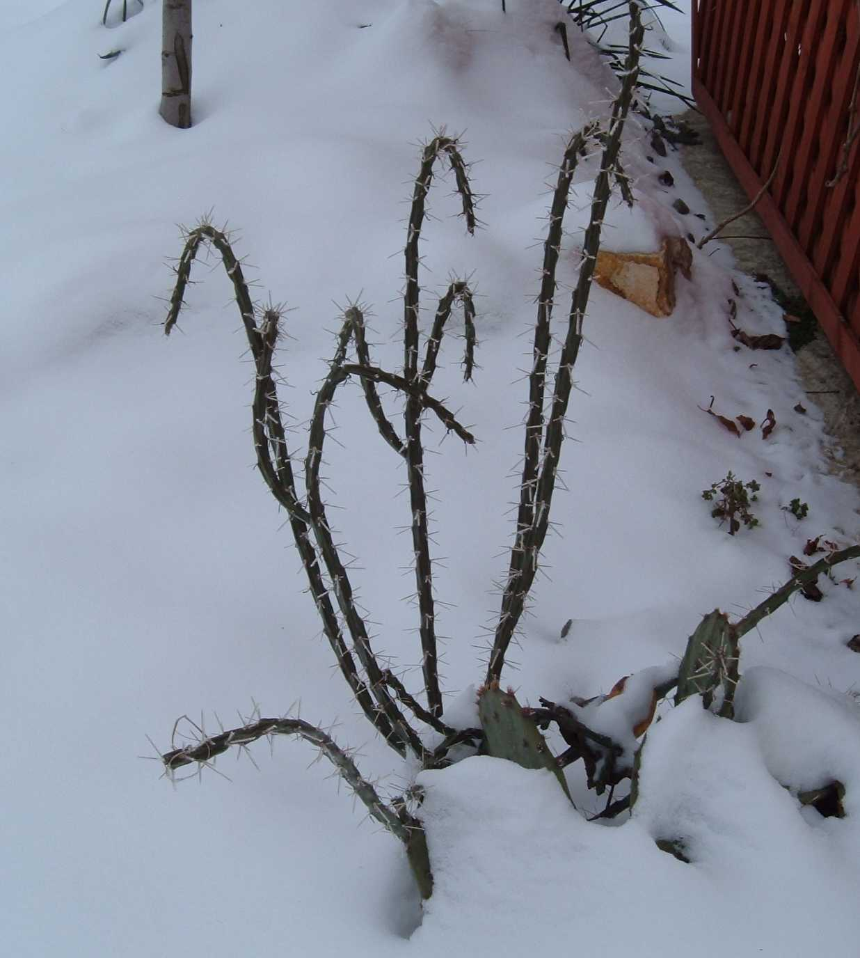 Cylindropuntia kleiniae télen, télálló kaktusz decemberben